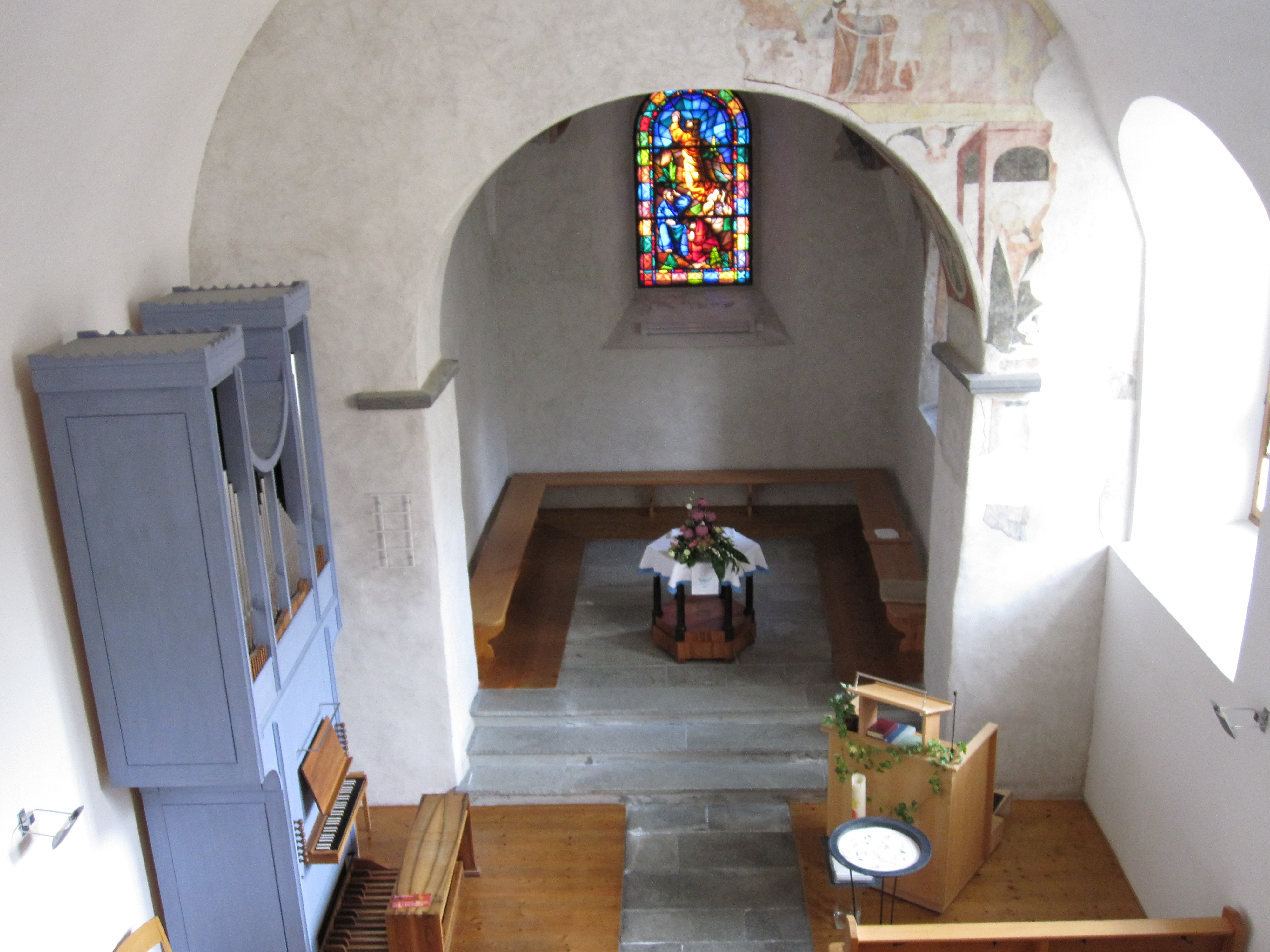 reformierte Kirche Masans in Chur